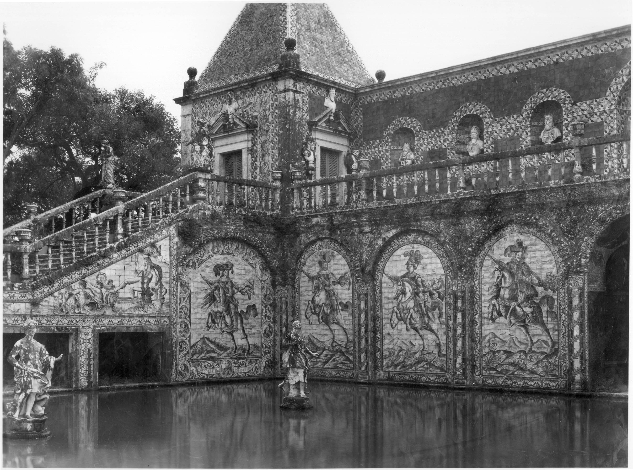 Painel de azulejos da Galeria dos Reis do Palácio dos Marqueses de Fronteira. Azulejos do século 17. Autor: João Miguel dos Santos Simões (1907-1972). Data de produção da fotografia original: 1960-1970. [CFT009.1381.ic]